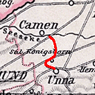 Nördlicher Teil der Bahnstrecke Fröndenberg–Kamen